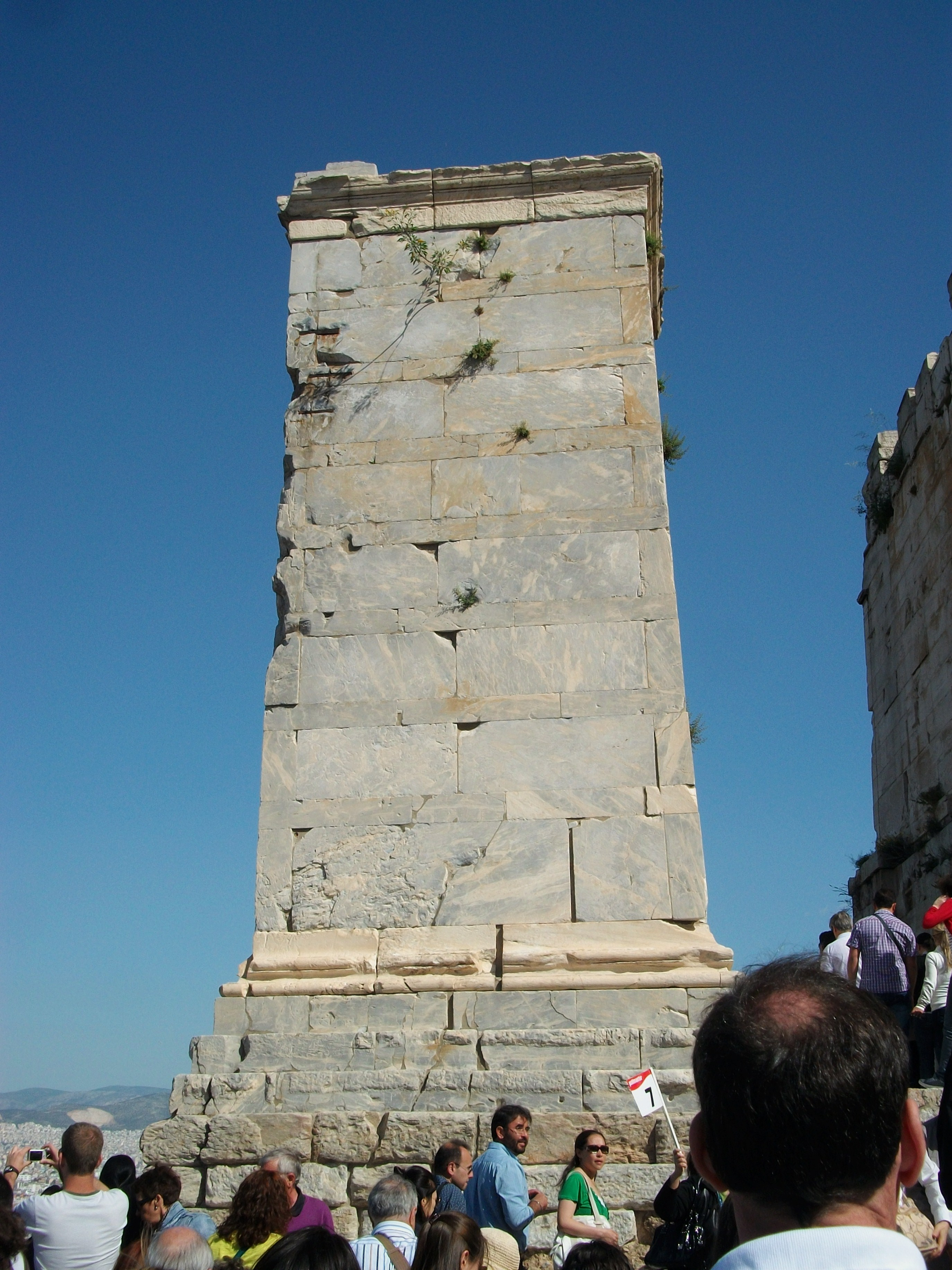 Monument a Agripa, propileus de l'Acròpoli d'Atenes.